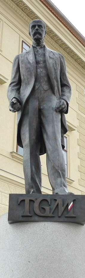 Prag - Otakar Španiel: Denkmal Tomáš Garrigue Masaryk (1931/2000) - das Denkmal des ersten Präsidenten und Gründers der Tschechoslowakei auf dem Hradschin-Platz in unmittelbarer Nähe zur Prager Burg wurde am 7. März 2000 anlässlich des 150. Geburtstages von Tomáš Garrigue Masaryk enthüllt. Die Statue ist ein Abguss nach dem Originalmodell des Bildhauers aus dem Jahr 1931.